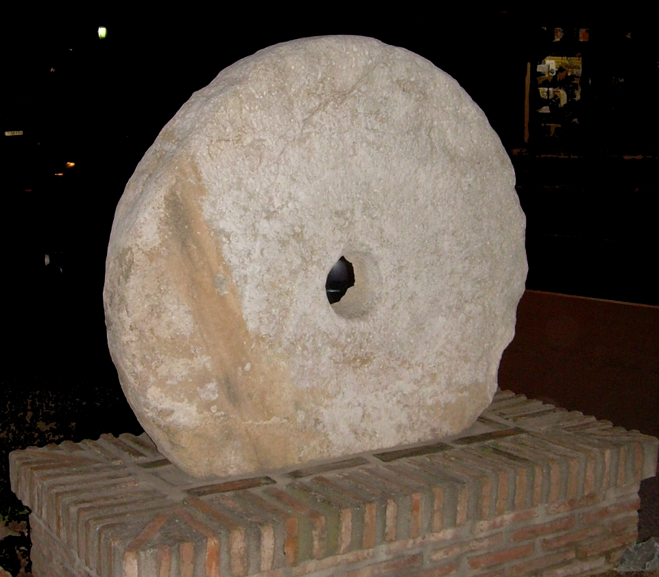 Antígua muela de molino de aceite usada para decoración urbana en Alhaurín de la Torre, Málaga, España Ancient wheel of mill, used now as urban decoration in Alhaurín de la Torre, Málaga